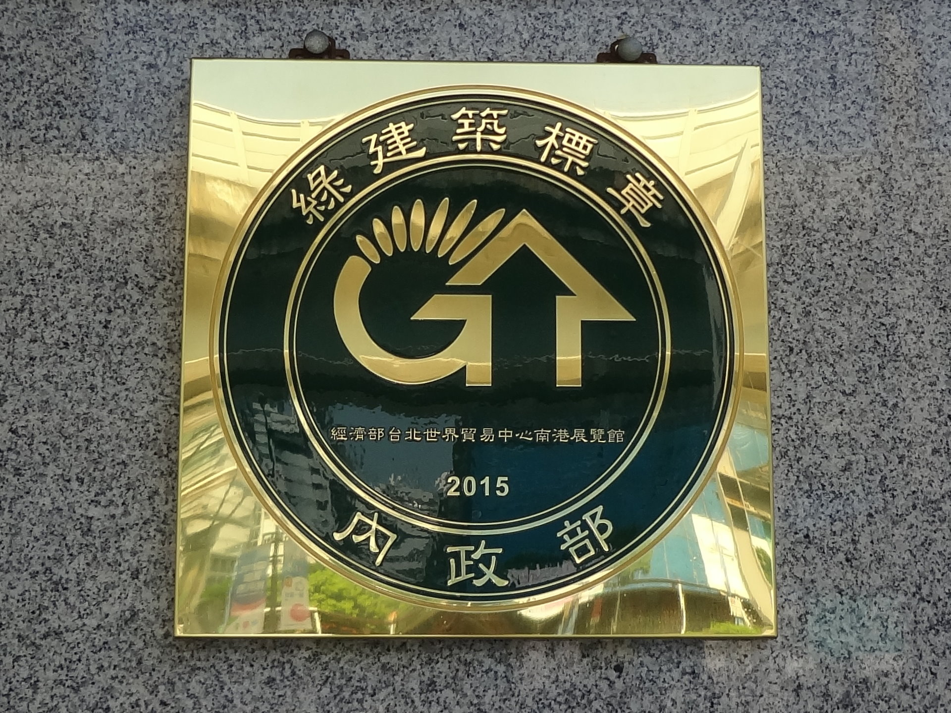 台北世界貿易中心南港展覽館的2015年中華民國內政部綠建築標章，釘掛於門牌上方。